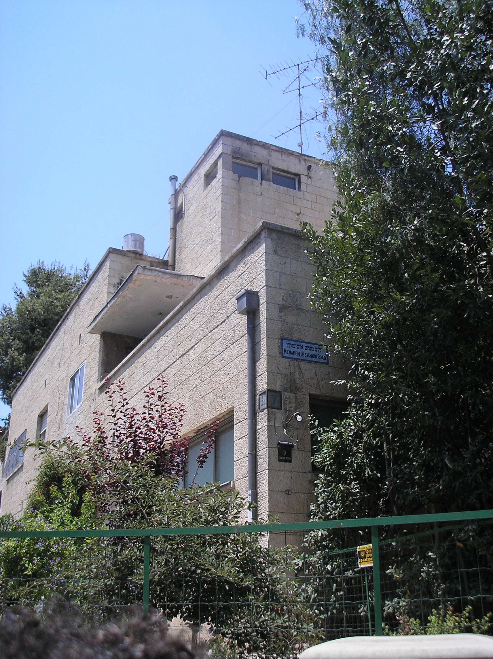 Beit Usishkin, Rehavia, Jerusalem